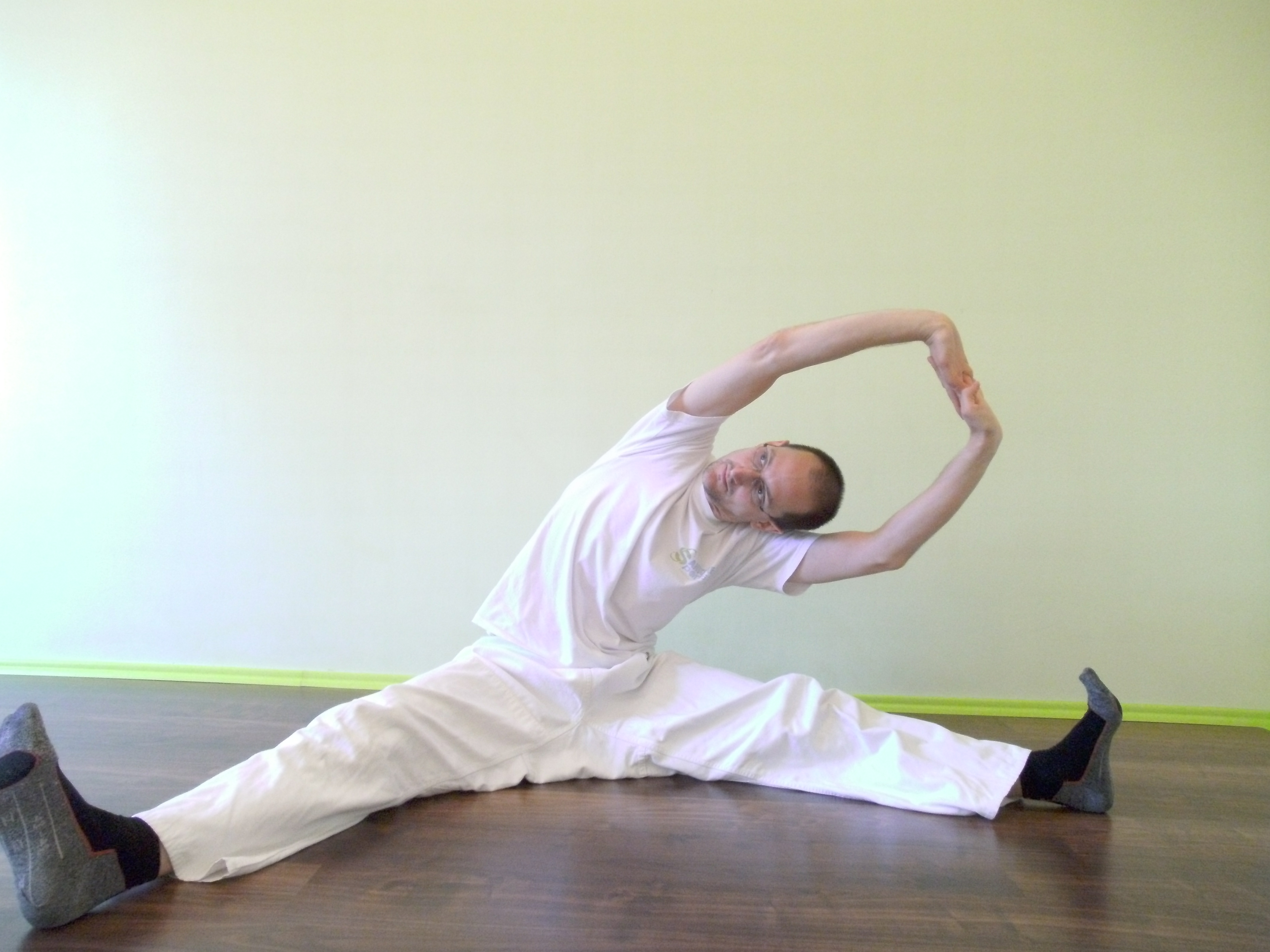 Makko Ho Übung für Gallenblasen und Lebermeridian 1